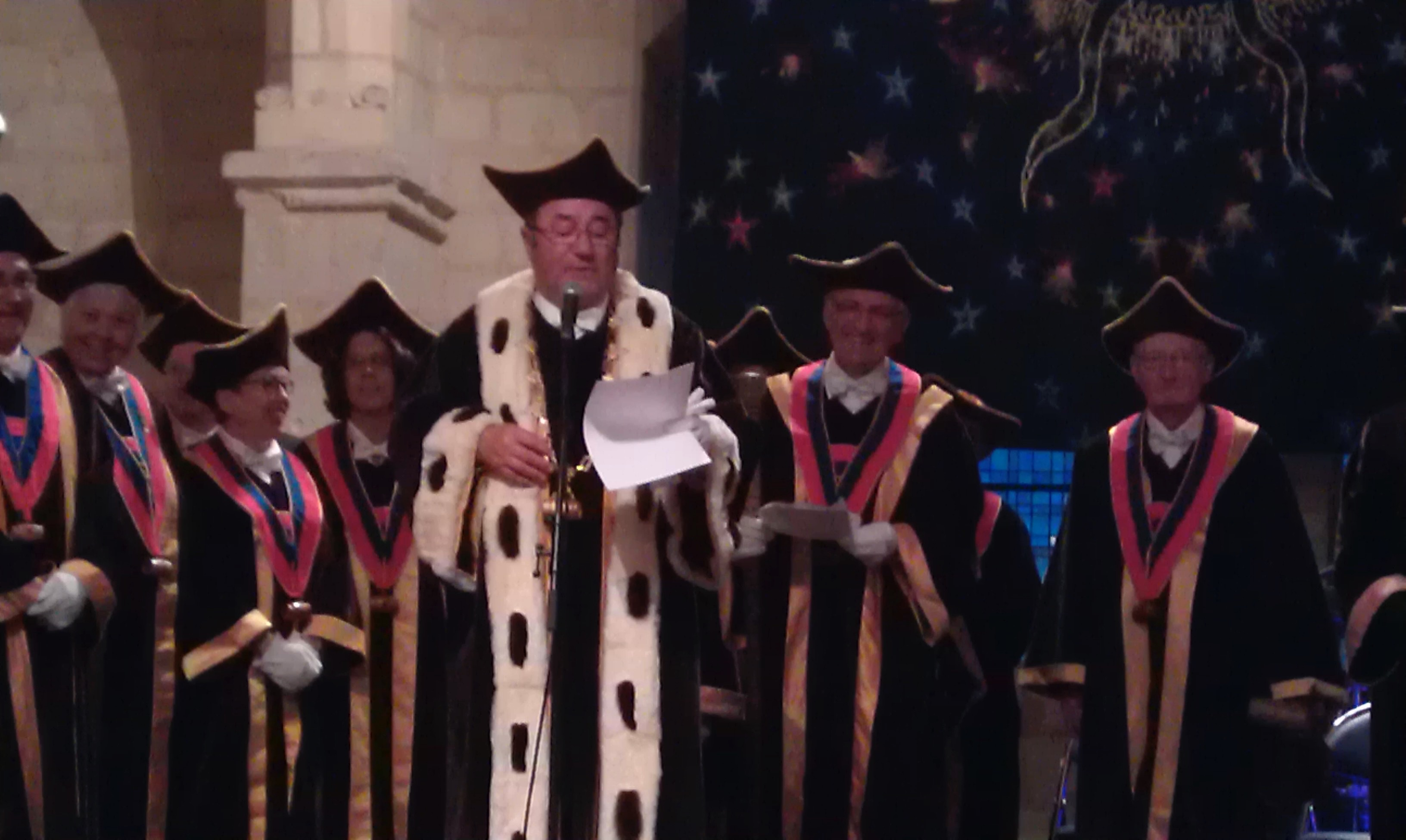 Ban des Vendanges 2014